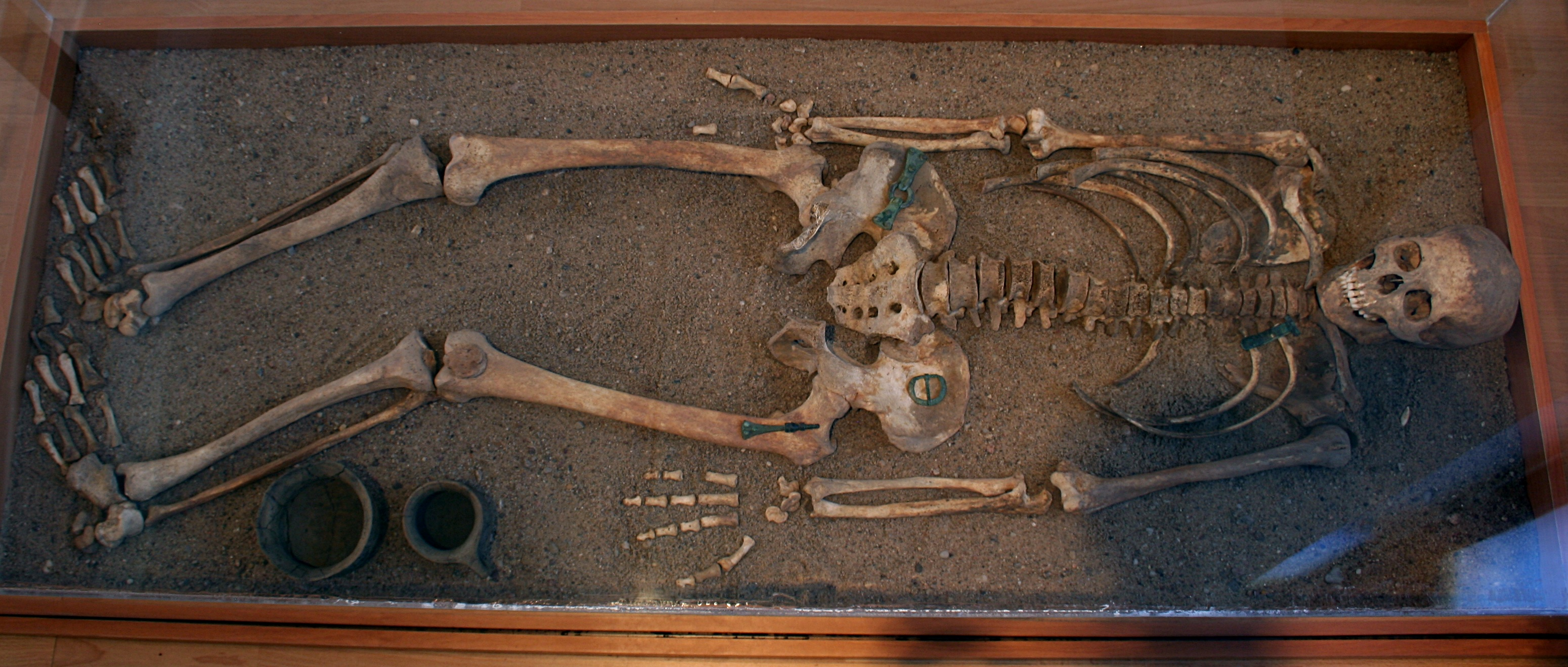 Wyposażenie gropu szkieletowego w muzeum w Odrach (oddział muzeum historyczno-etnograficznego w Chojnicach)